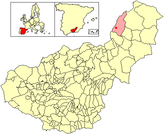 Situación de la localidad de Cañadas (en el municipio de Castril) respecto a la provincia de Granada, en España.